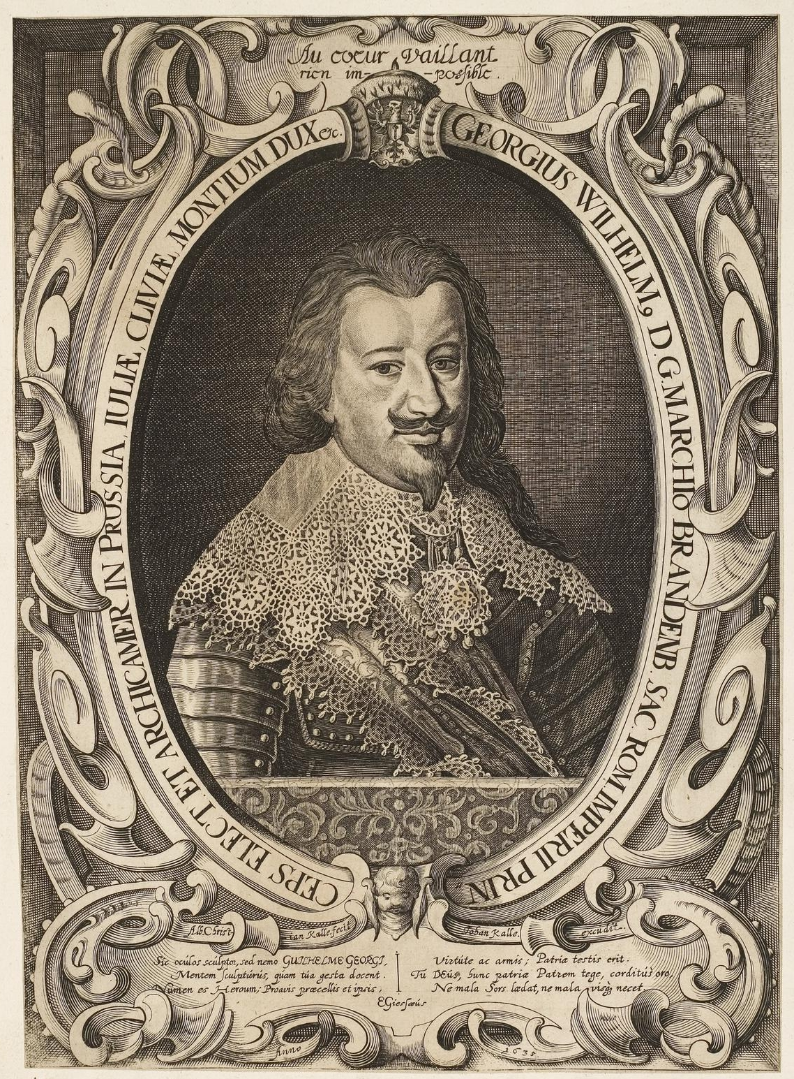 Grafik aus dem Klebeband Nr. 1 der Fürstlich Waldeckschen Hofbibliothek Arolsen Motiv: Kurfürst Georg Wilhelm von Brandenburg